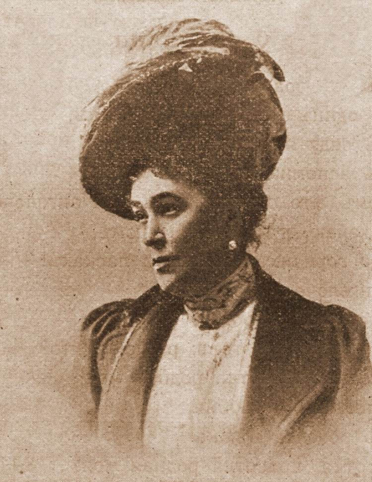 Раиса Раисова (Раиса Мойшевна Магазинер), русская певица еврейского происхождения, солистка оперетты и исполнительница романсов, примадонна